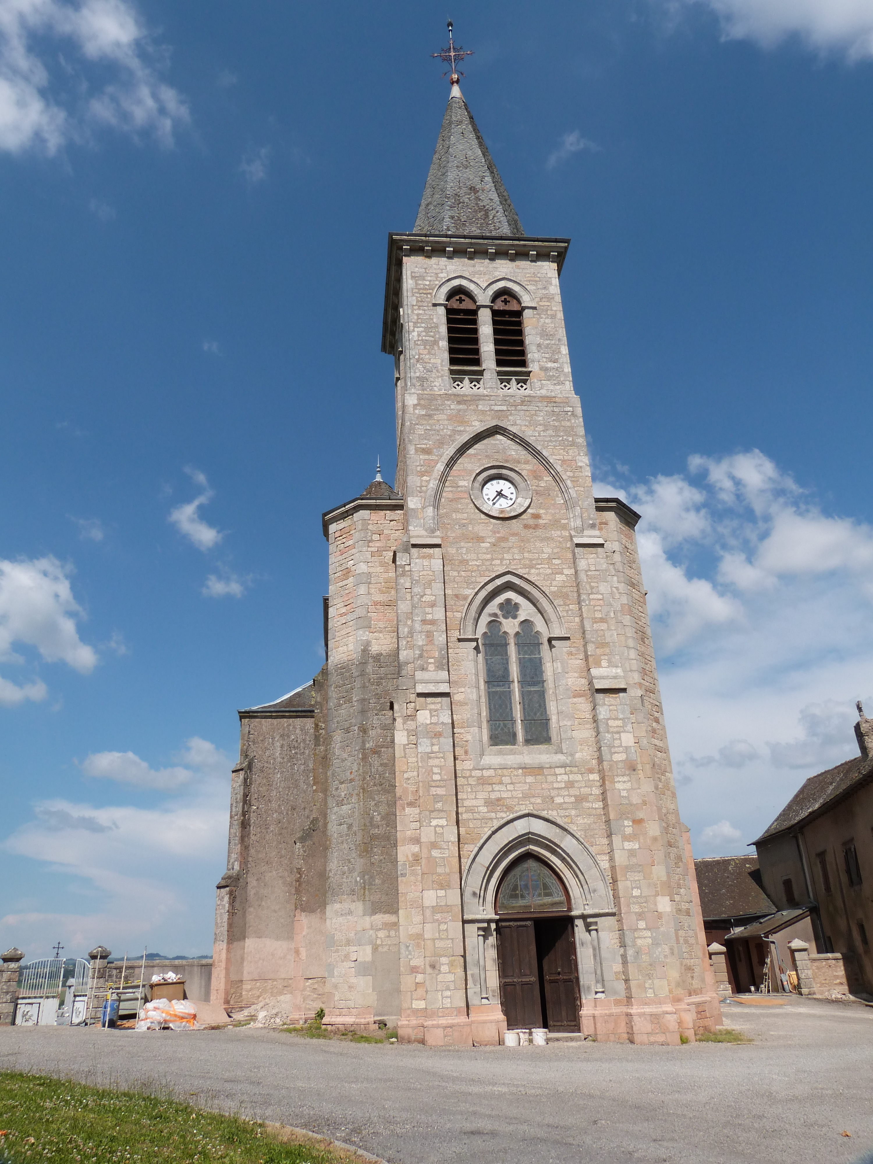 Église Notre-Dame-de-l'Assomption de style néogothique à Lescure-Jaoul (Aveyron)